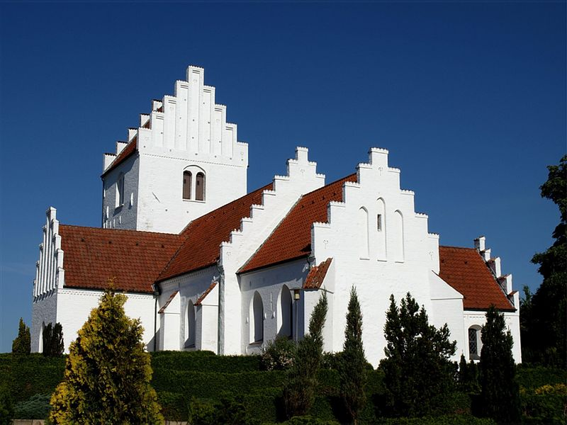 Tømmerup Kirke i Danmark. Tømmerup kirke